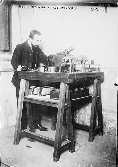 Édouard Belin (1876 - 1963), French inventor